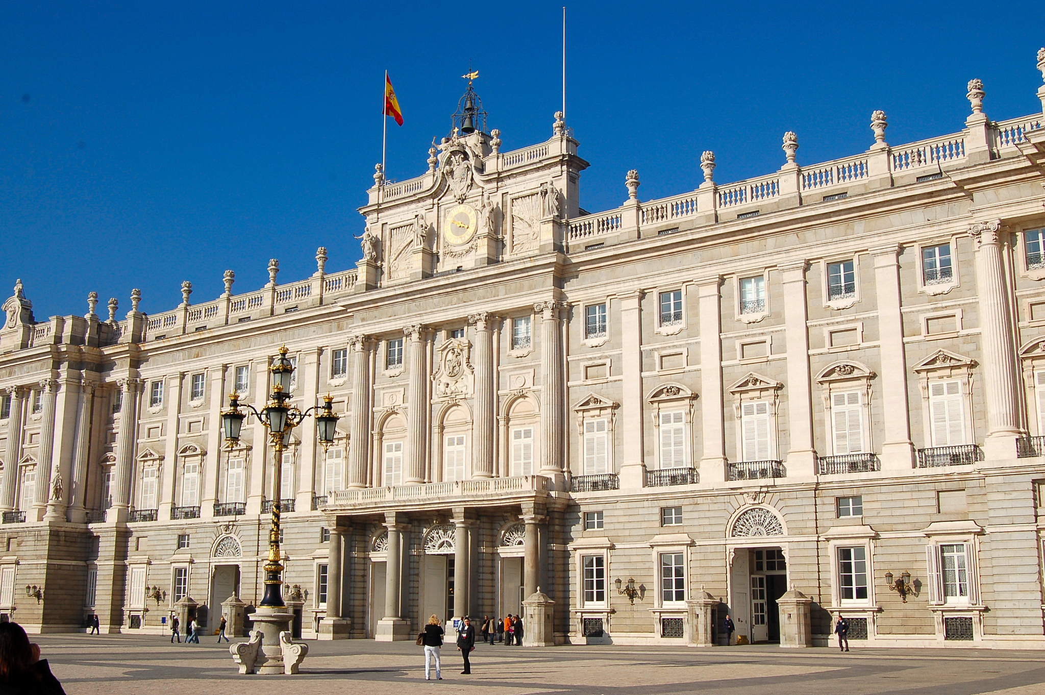 Palacio Real de Madrid